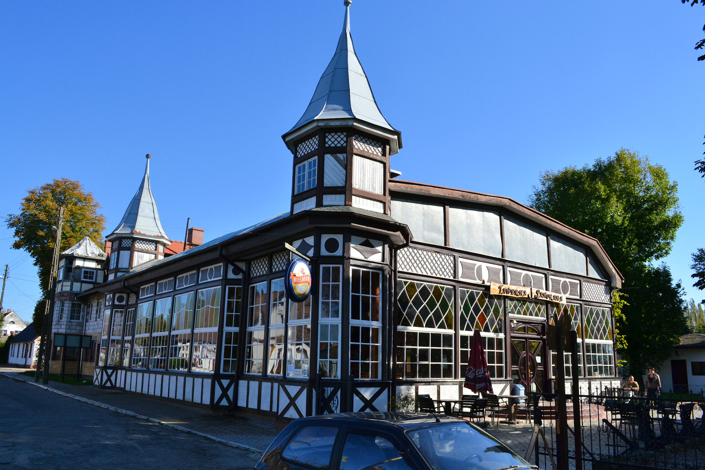 Stepnica